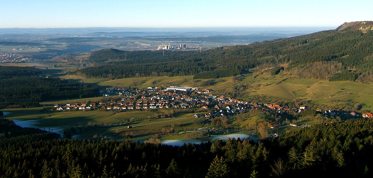 Blick auf Ratshausen vom Ortenberg aus. Im Hintergrund Dotternhausen mit den Gebäuden der Fa. Holcim.